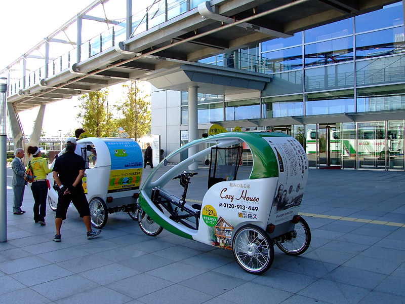 新潟市内でも走ることになったベロタクシー。朱鷺メッセ前で開催されたベロタクシー試乗会のようす。